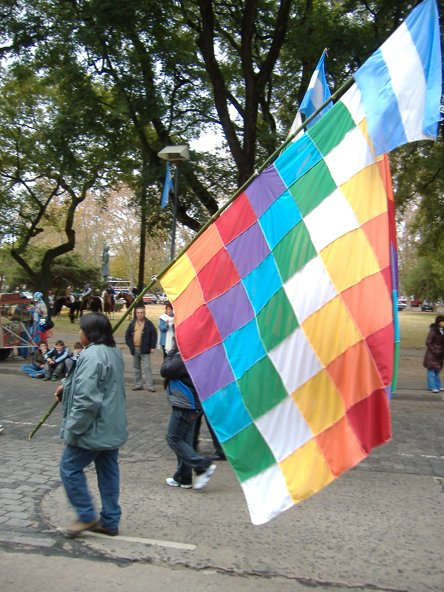 Wiphala, or banner of the Inca Empire, representing the native peoples of the central Andes and Bolivian Amazon region of South America, taken on parade during the celebration of Flag Day 2007 in Rosario, Argentina by a representative of the indigenous communities of the country.